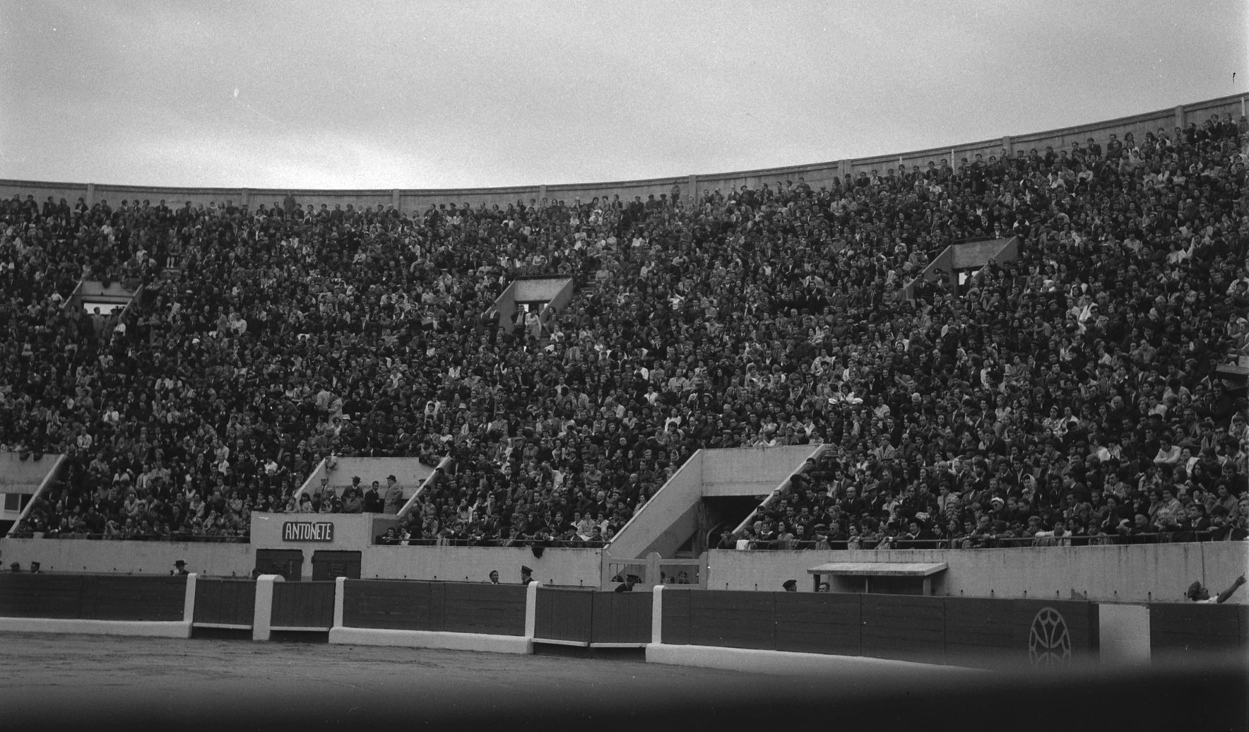 Les arènes de Toulouse. 5 Mai 1968. Vue du public des arènes de Toulouse.